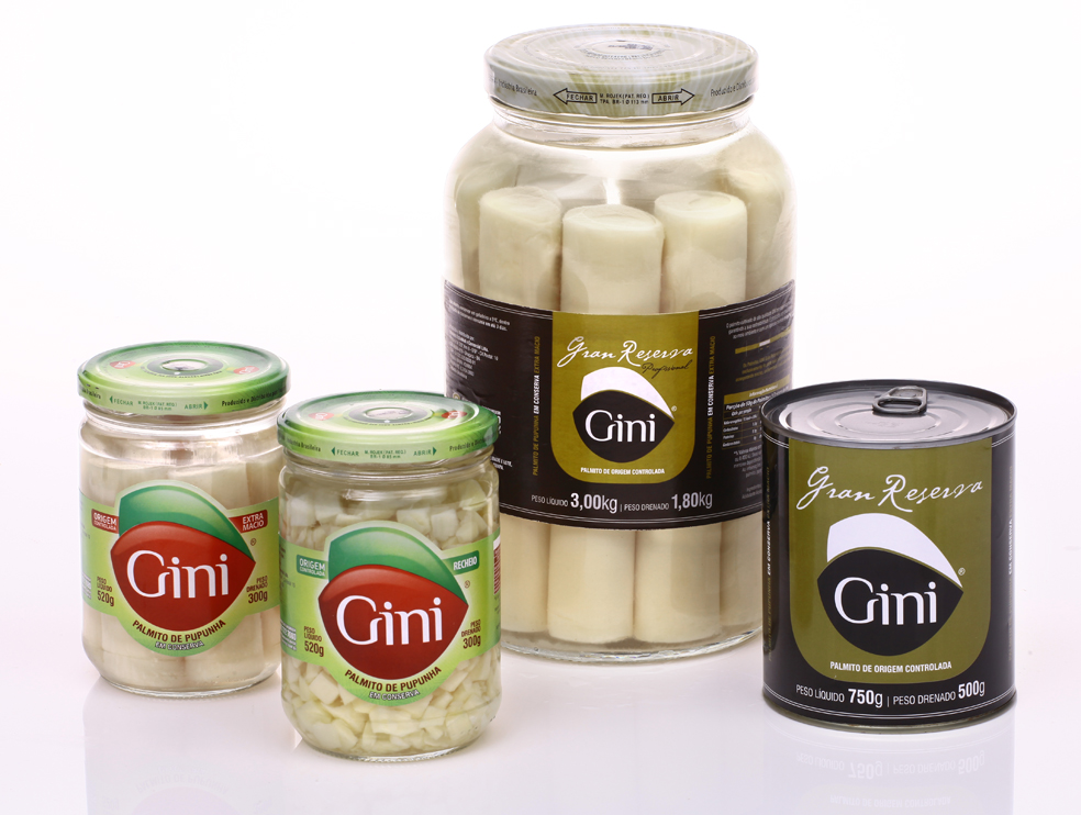 Linha completa de produtos Gini (Extra Macio, Recheio, Gran Reserva Profissional e Gran Reserva ).